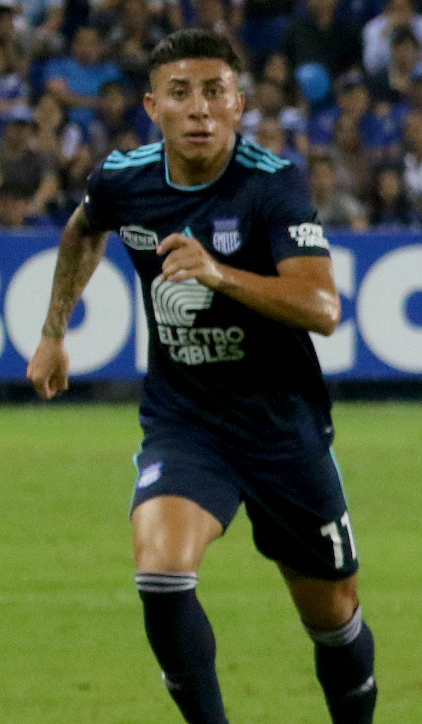 Guayaquil, jueves 19 de abril del 2018 (Andes).-En el estadio Capwell, Emelec enfrenta a River Plate, en partido del grupo D de la Copa Libertadores.Foto:César Muñoz/Andes